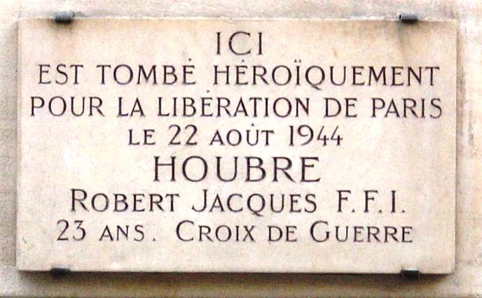 Plaque en mémoire de Robert Jacques Houbré, FFI. Rue de Vaugriard, Paris 6e (au croisement avec le boulevard Saint-Michel).